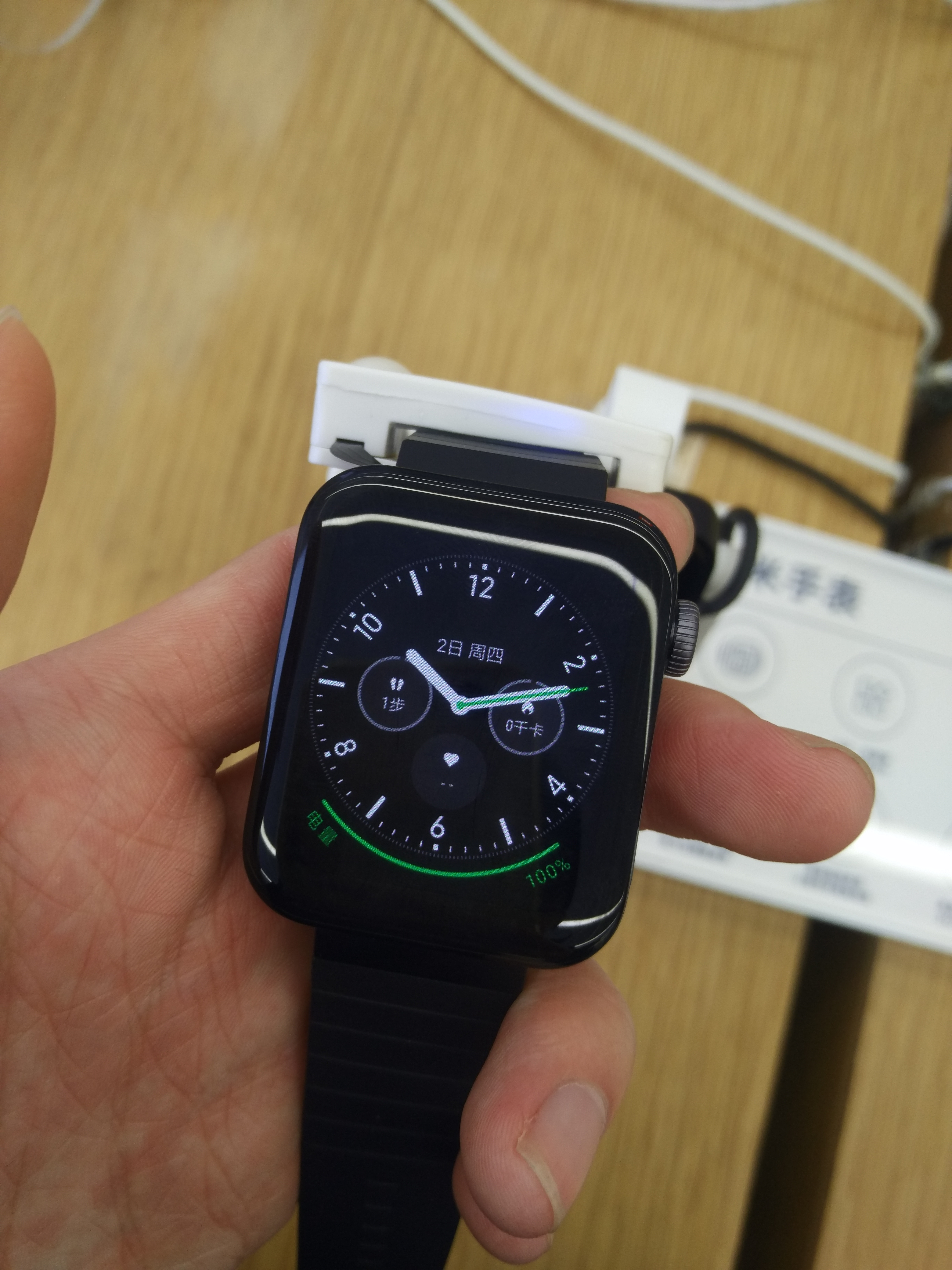 展示在小米之家的小米手錶